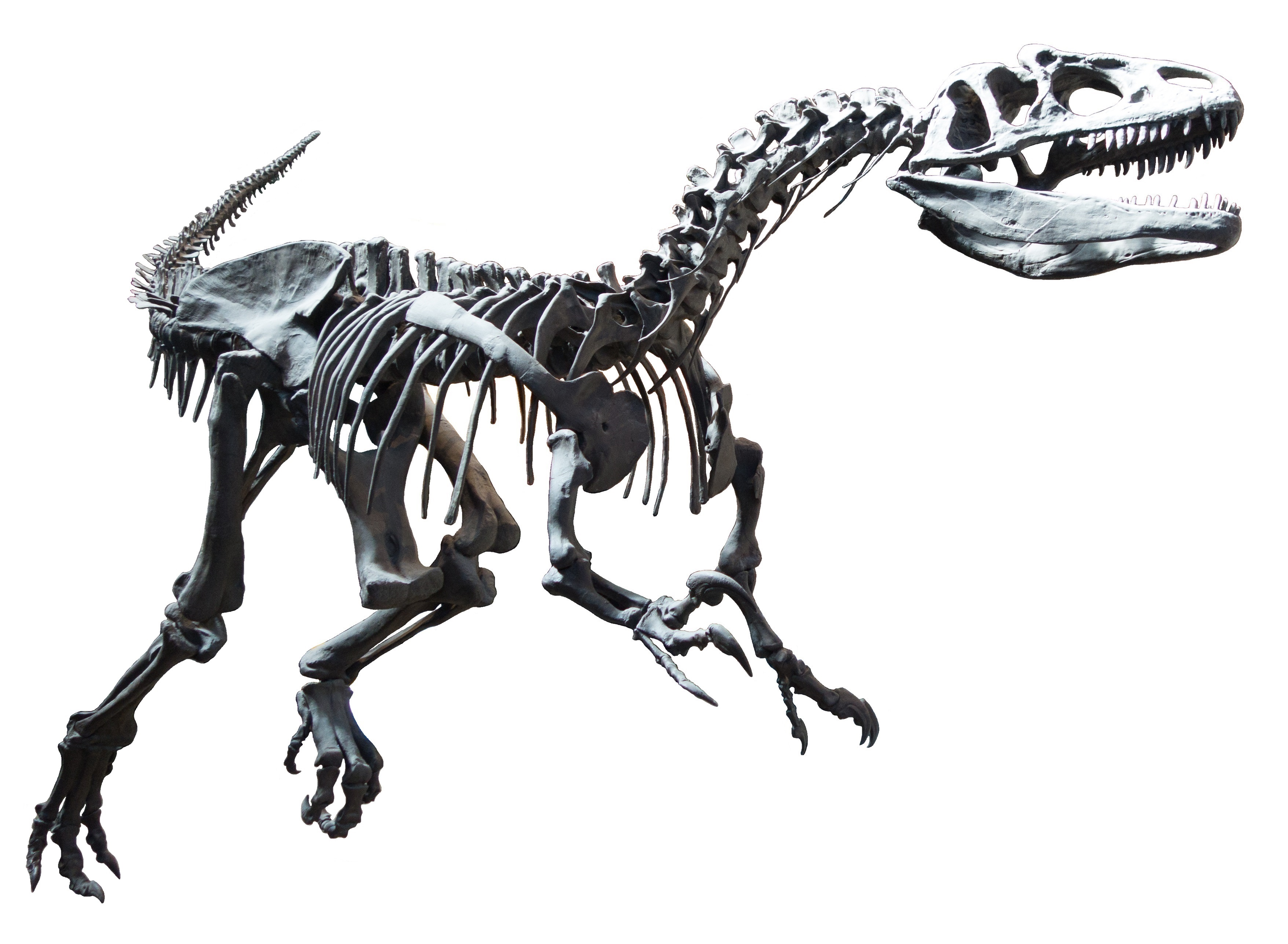 Allosaurus